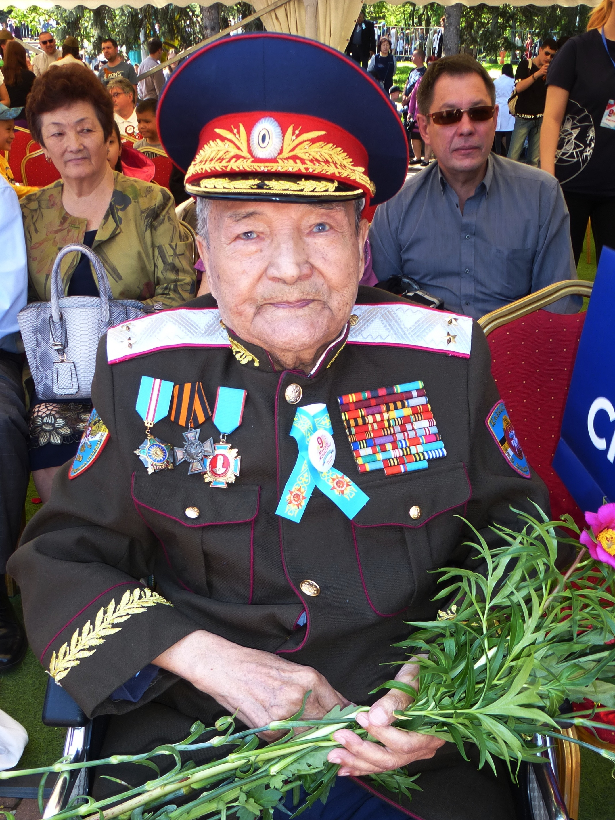 Жуматов Габбас Жуматович